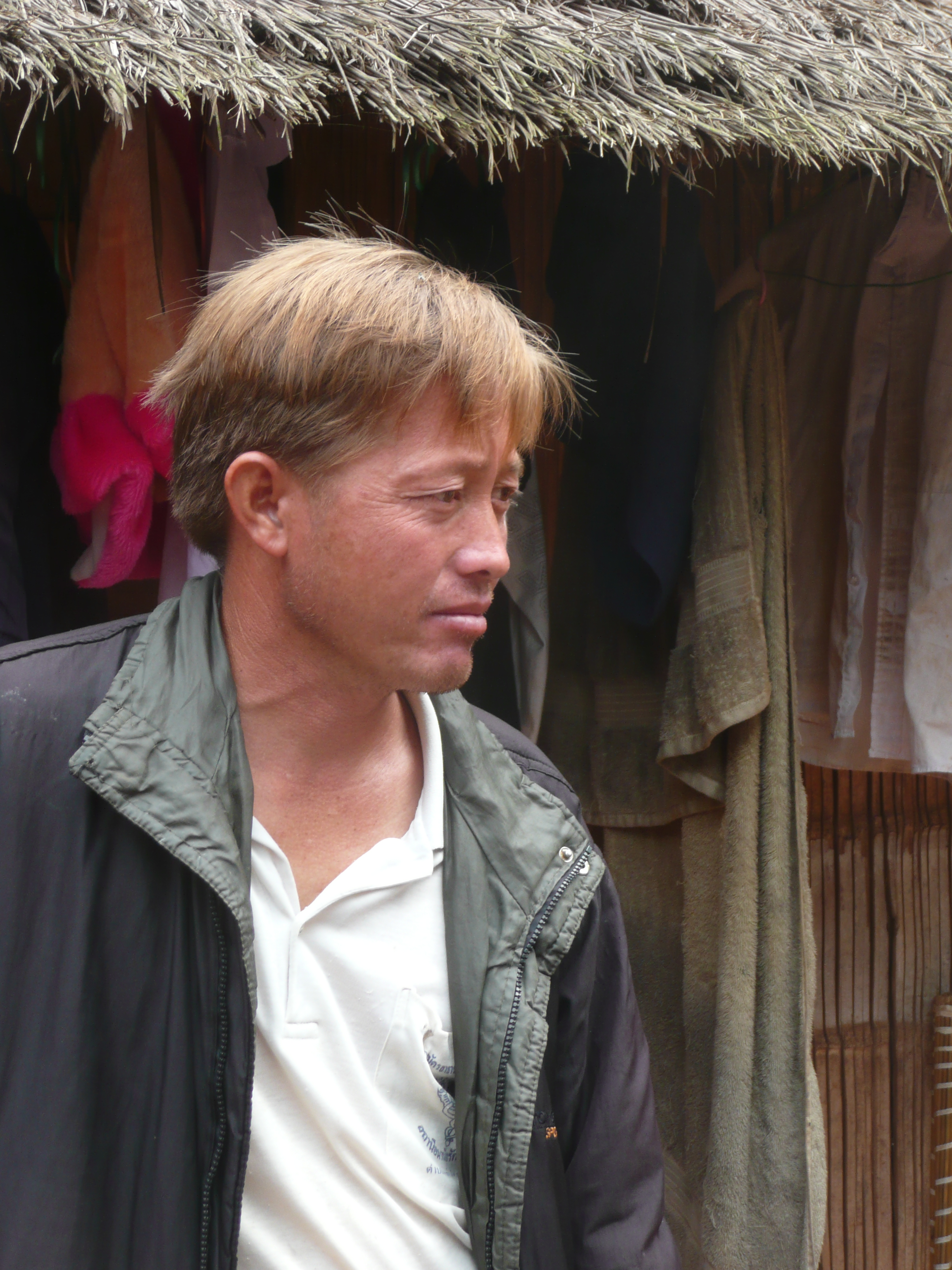 Hmong man